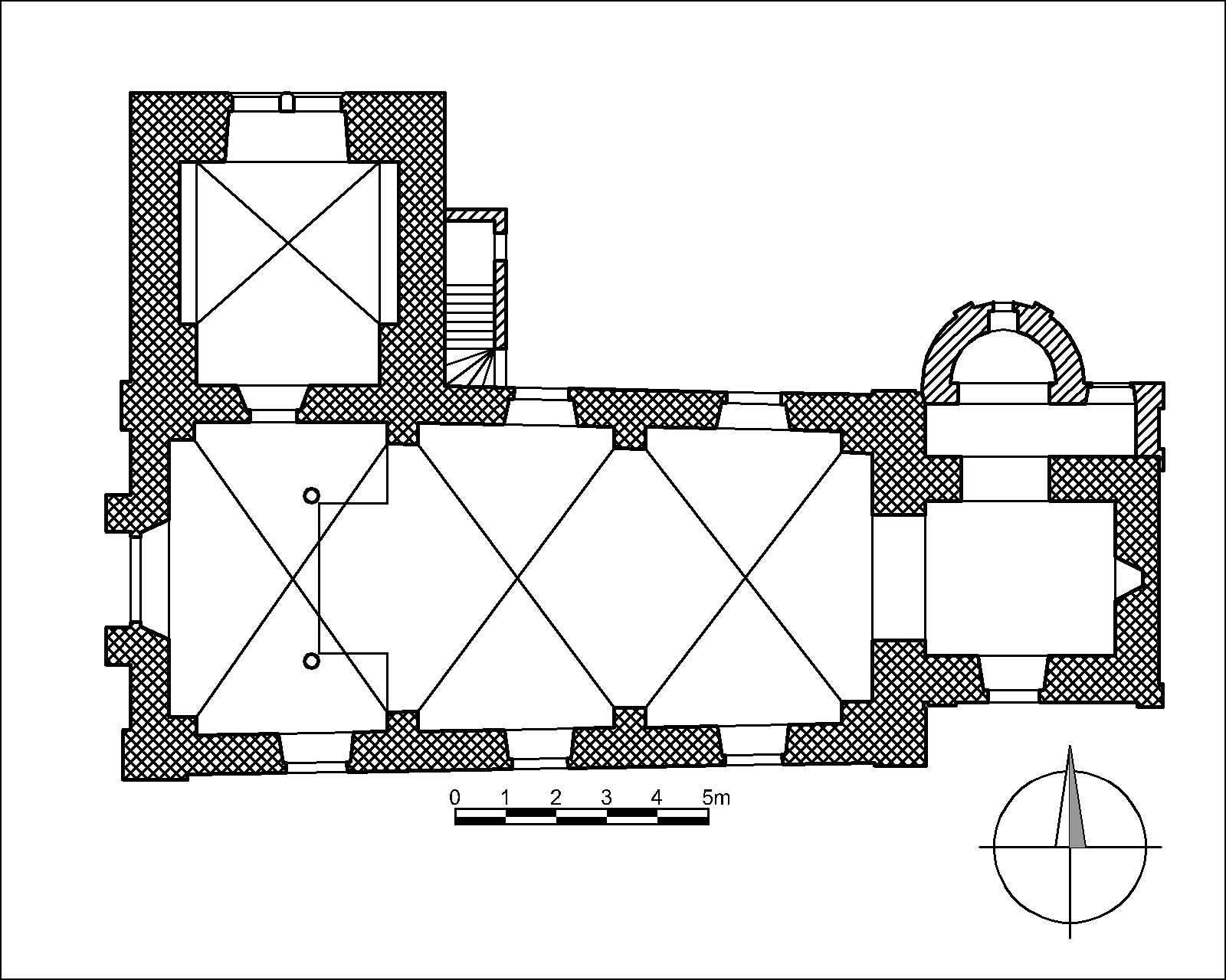 Kostel Nanebevzetí Panny Marie, Národních hrdinů, Dolní Počernice. Půdorys kostela podle A. Podlaha, E. Šittler: Soupis památek, svazek XV, str 283.